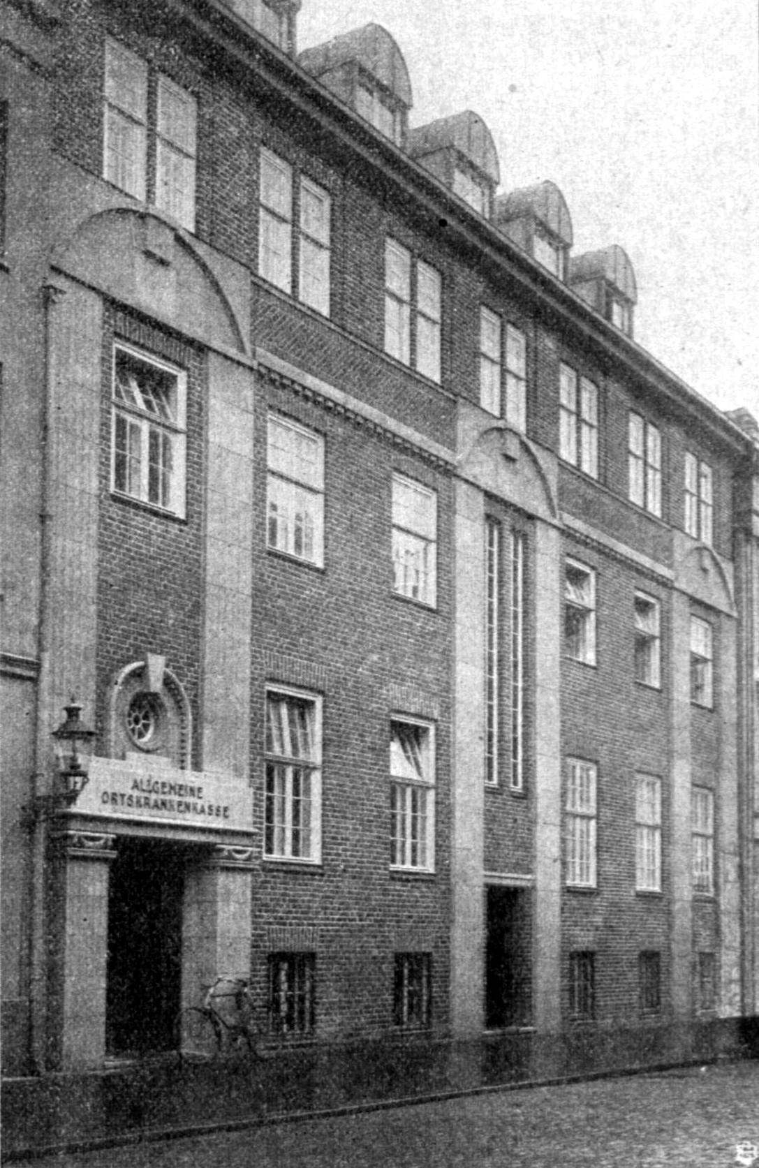 Das neue Gebäude der Allgemeinen Ortskrankenkasse in der Fleischhauerstraße 55-57 Kategorie:Datei:Lübeck.